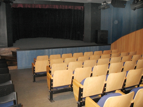 Divadélko JoNáš v suterénu Měšťanské besedy v Plzni